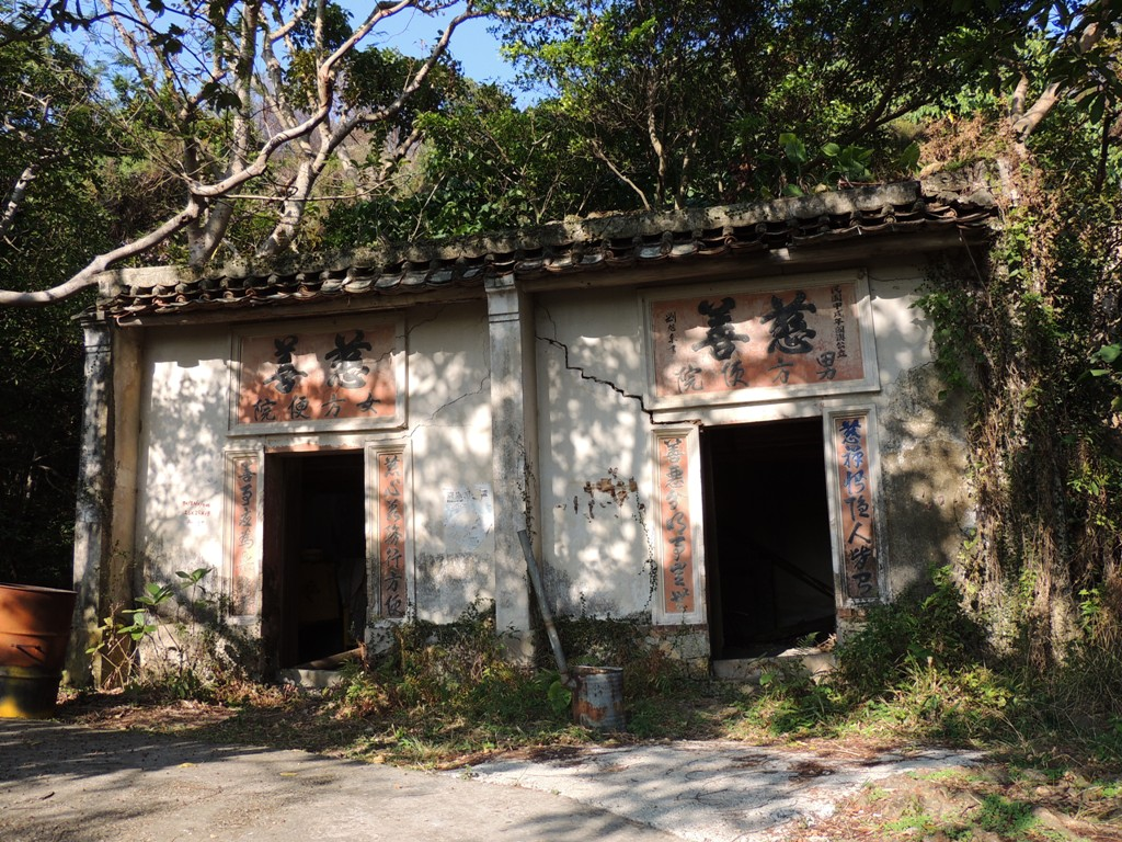 Fong Bin Yuen, Tai O (大澳慈善方便院)